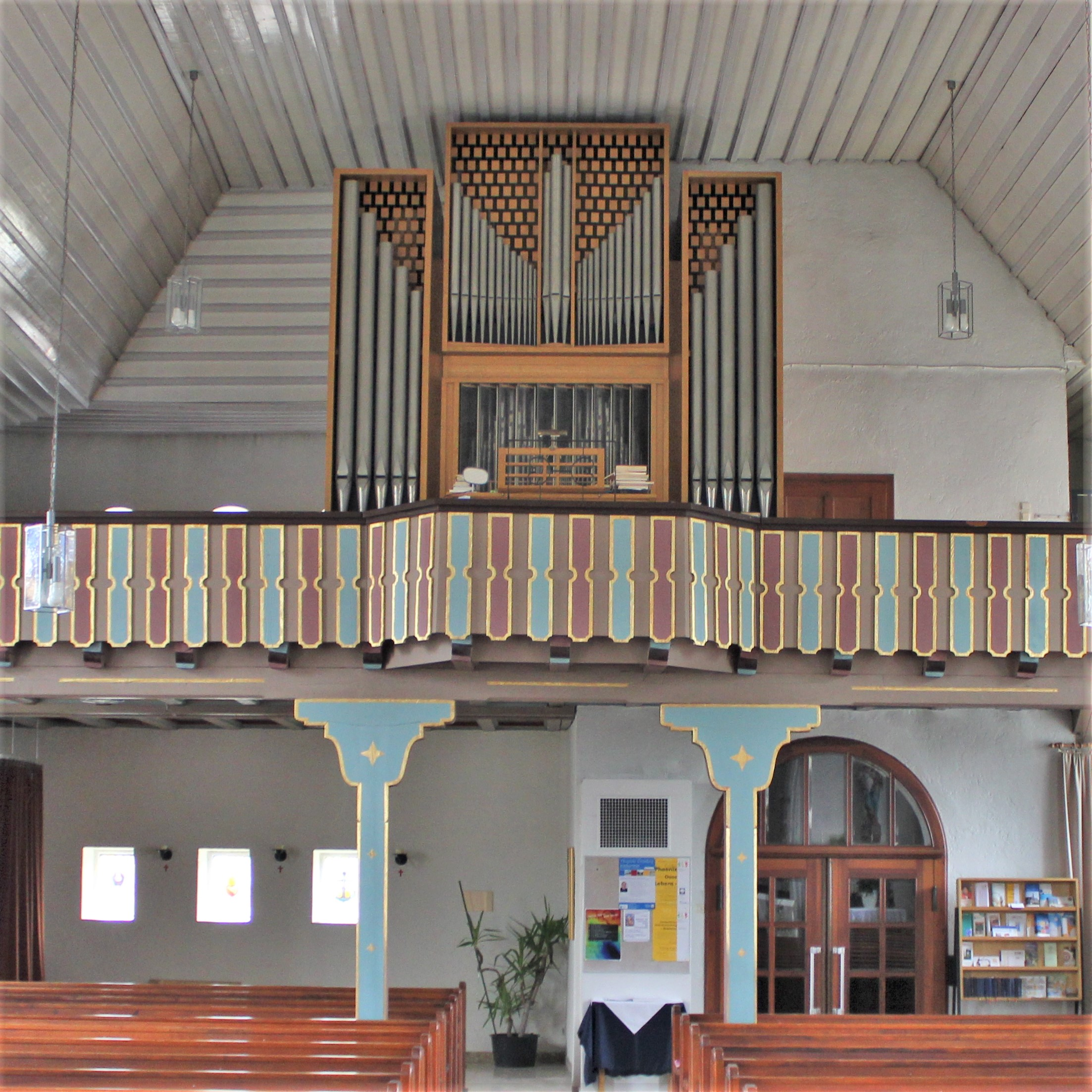 Blick ins Innere der katholischen Kirche St. Remigius in Wittersheim, Mandelbachtal, Saarland.